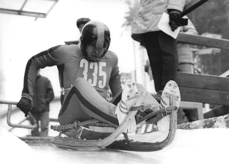 Bernd Dreyer ADN-ZB Schaar 25.1.1976-Imst: Junioren-Europameisterschaften der Rennschlittensportler-Überlegener Sieger der wegen der schlechten Witterungsbedingungen an den Vortagen nur am 25.1. auf einer verkürzten Strecke ausgefahrenen Titelkämpfe wurde Bernd Dreyer (SC Traktor Oberwiesenthal) mit 1:24,10. (Archivfoto)